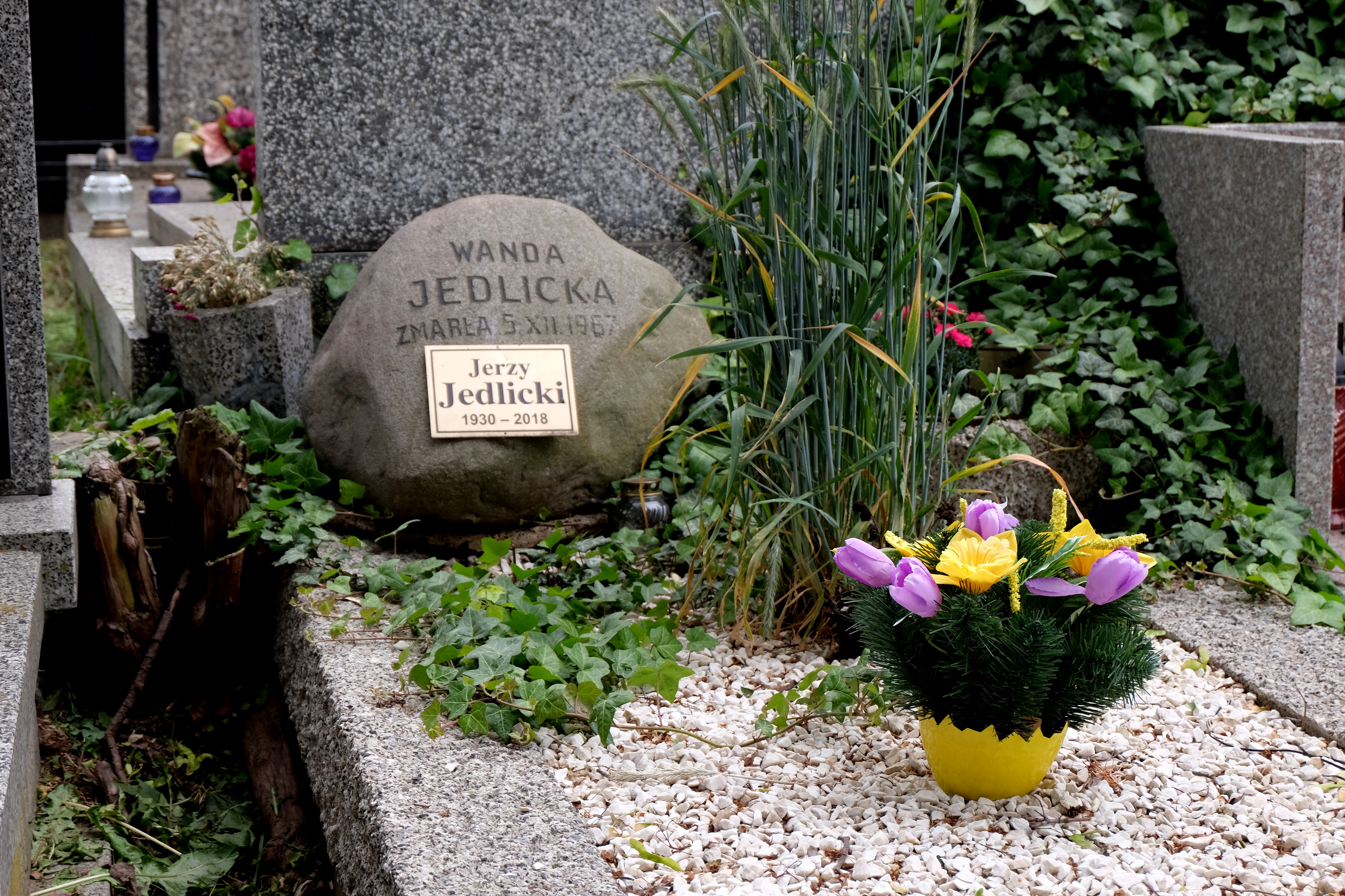 Grób historyka idei Jerzego Jedlickiego na Cmentarzu Wojskowym na Powązkach w Warszawie